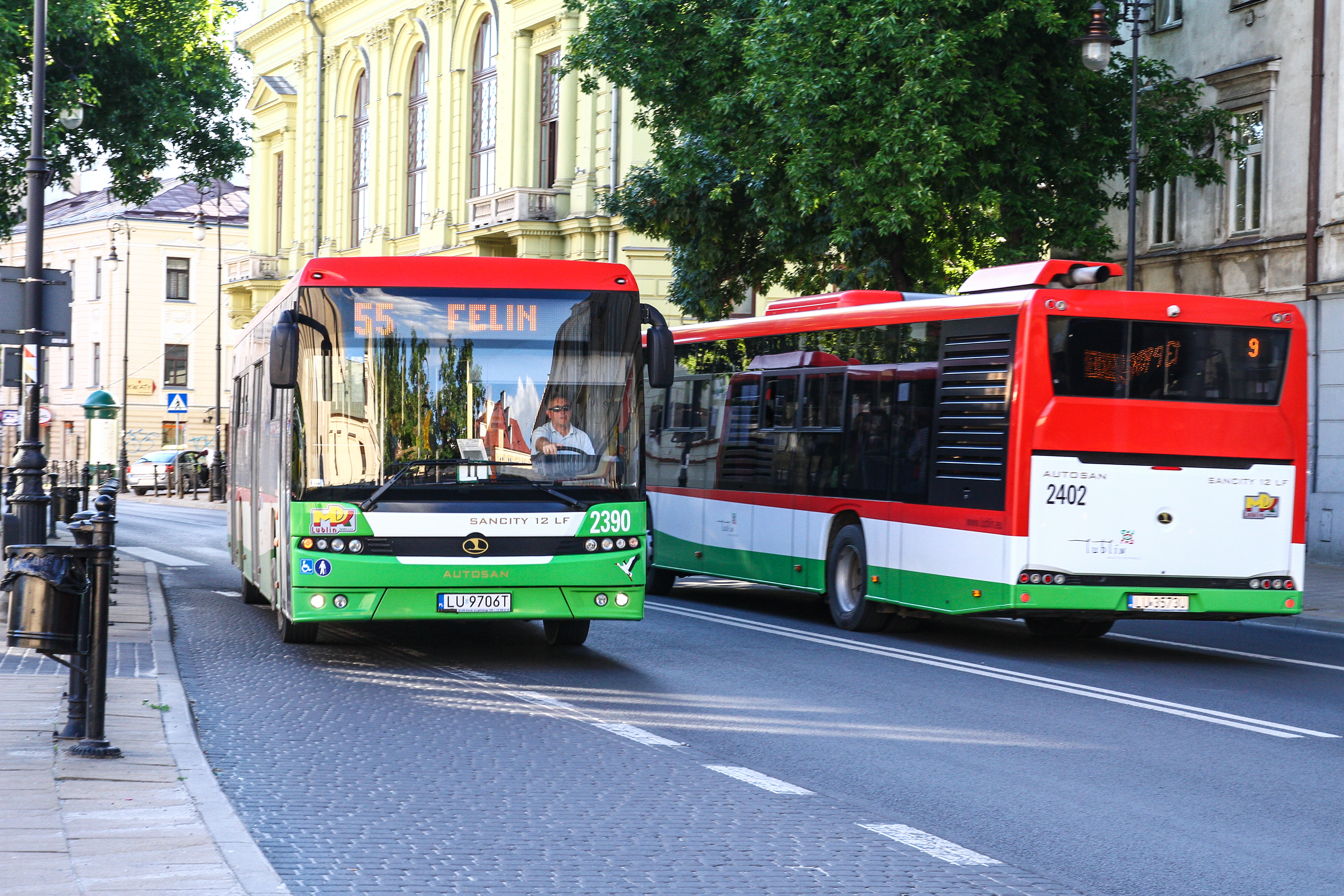 Autobus Autosan 12LF